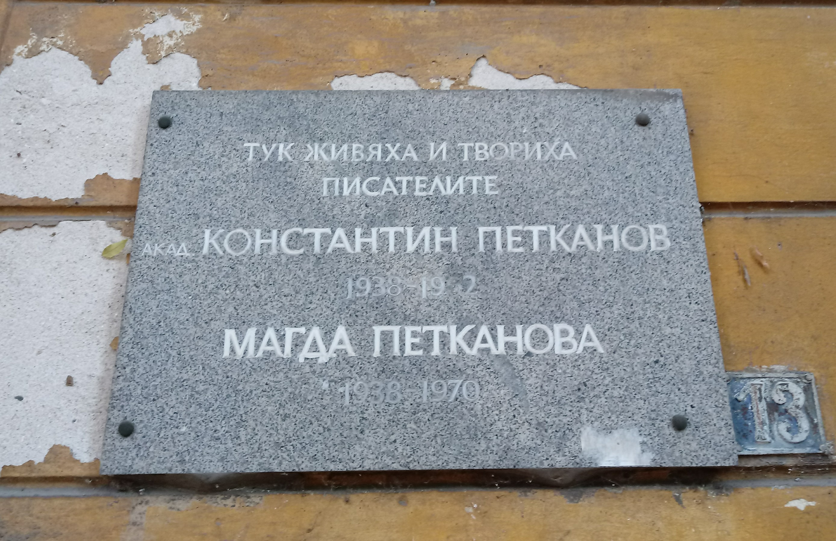 Konstantin Petkanov, Magda Petkanova memorial plaque, 13 Gerlovo str., Sofia